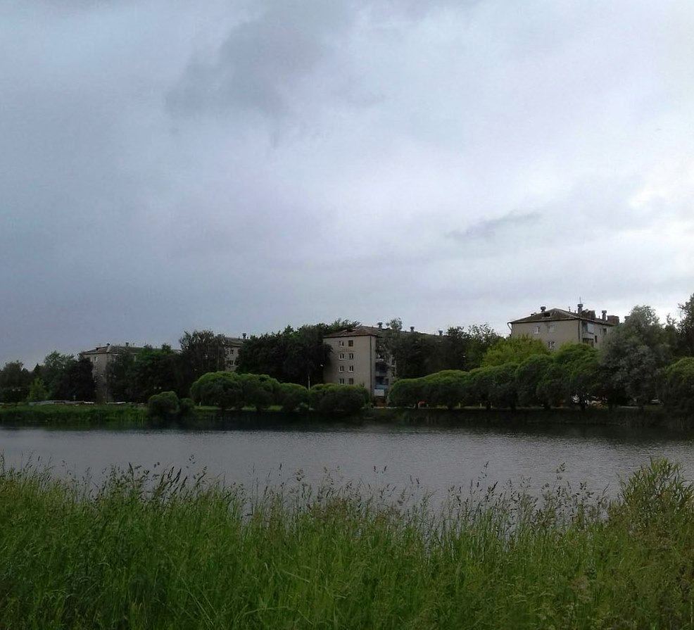 Вид на пруд и дома по ул. Титова, июнь 2016 г.